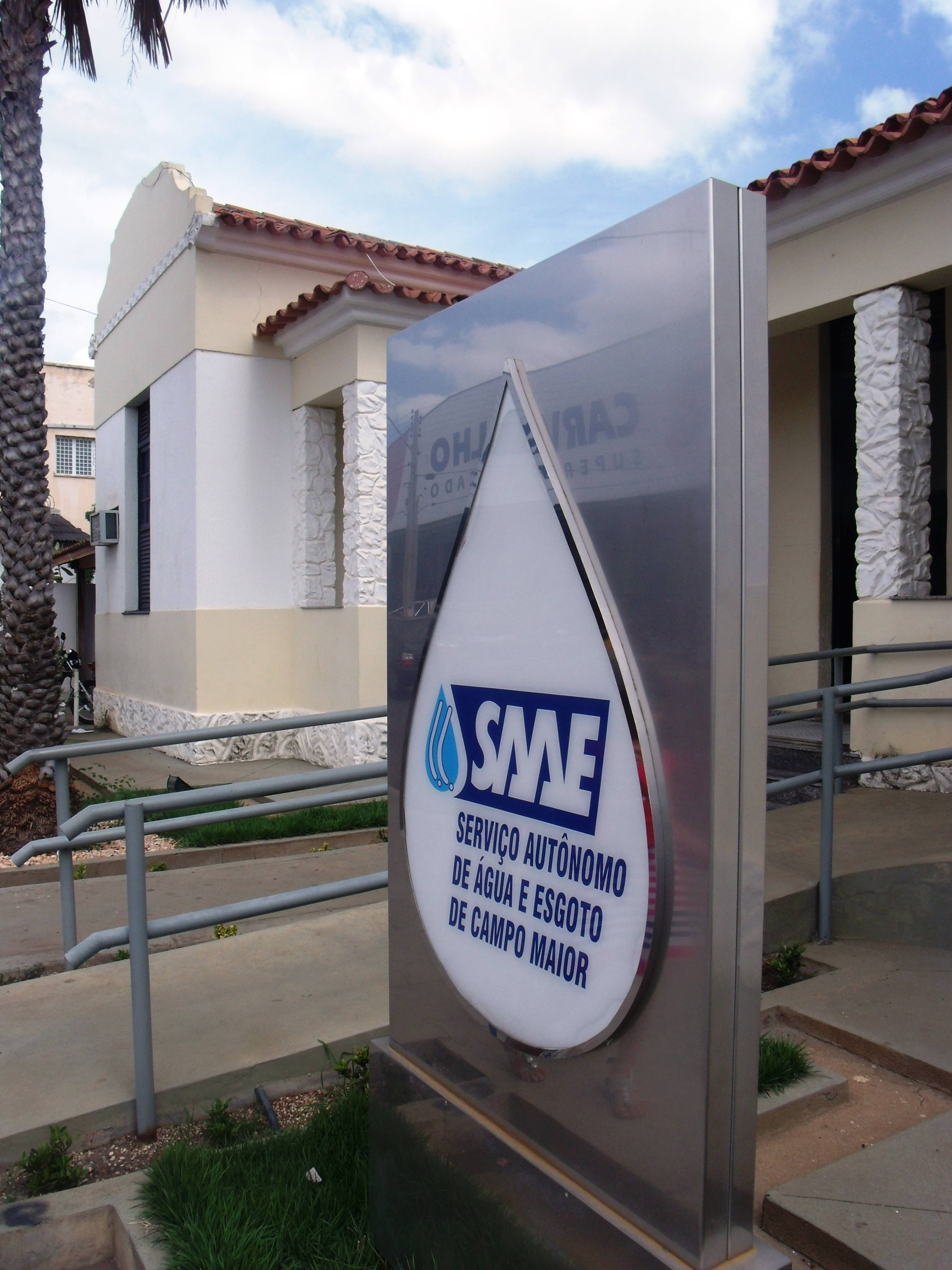 Imagem parcial do Palacete do SAAE em Campo Maior, Piauí